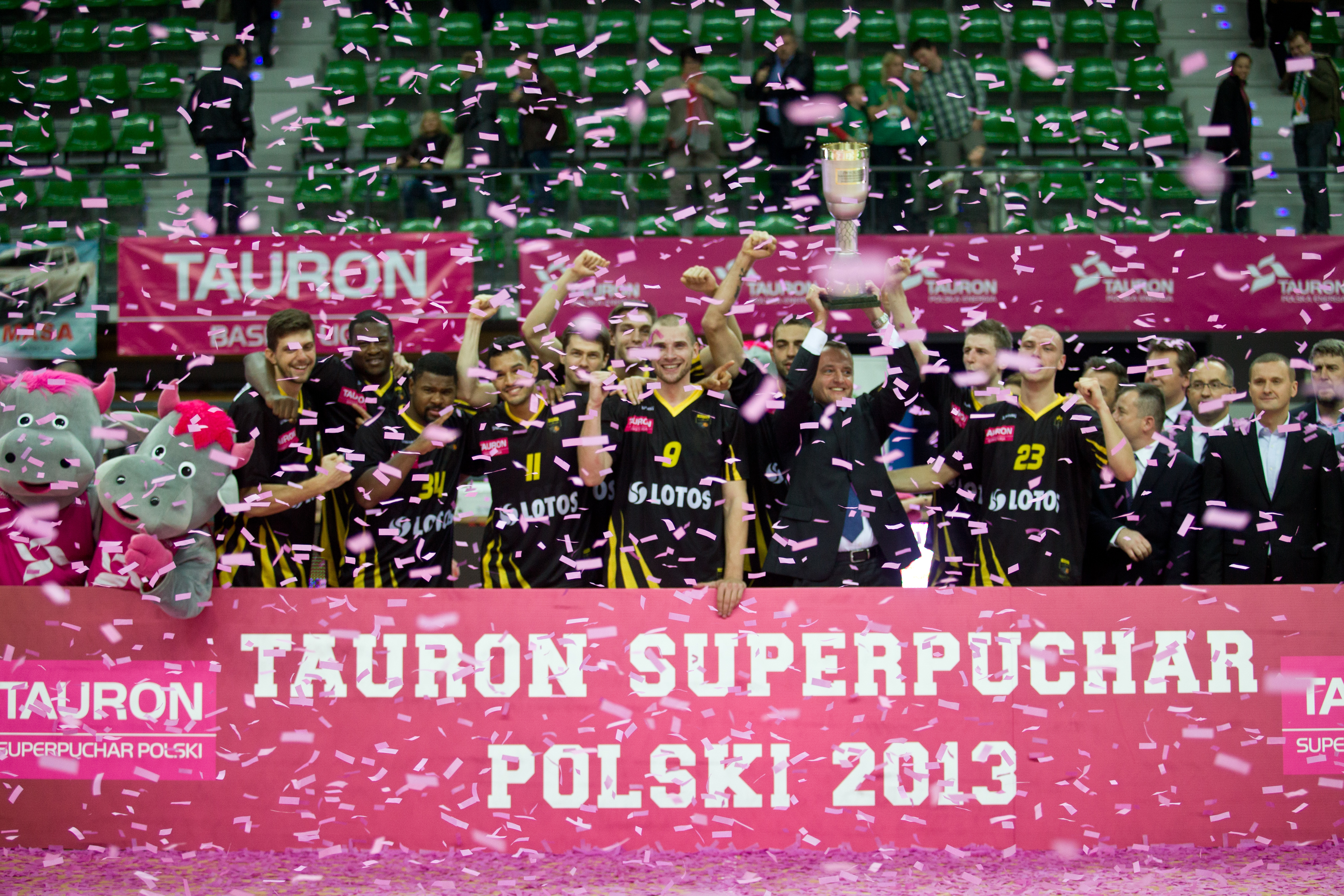 Treﬂ Sopot, zdobywca Tauron Superpuchar Polski 2013